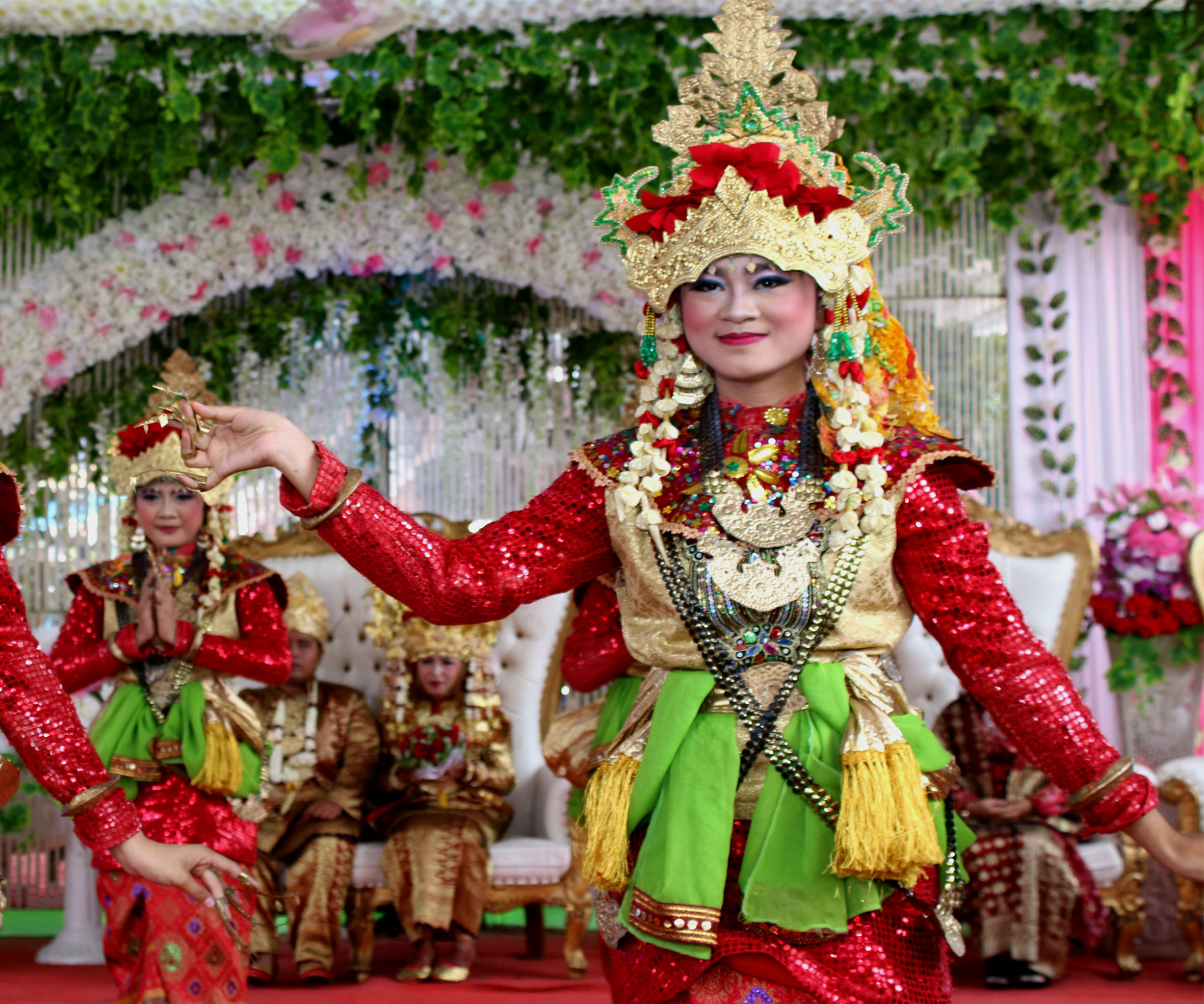 Tari Pagar Pengantin adalah tari tradisonal yang berasal dari Provinsi Sumatera Selatan. Tari Pagar Pengantin biasanya ditampilkan pada acara resepsi pernikahan adat Palembang dan Sumatera Selatan pada umumnya. Tari Pagar Pengantin memiliki arti filosofis yang bermakna perpisahan pengantin perempuan kepada keluarganya yang lama dan memohon izin untuk membentuk keluarga yang baru. Tari Pagar Pengantin juga mempunyai fungsi sebagai tari penyambutan kepada seluruh tamu undangan yang hadir pada resepsi pernikahan tersebut. Tarian ini biasanya ditarikan oleh lima orang penari perempuan termasuk sang pengantin ( Sumber : Wikipedia Indonesia )